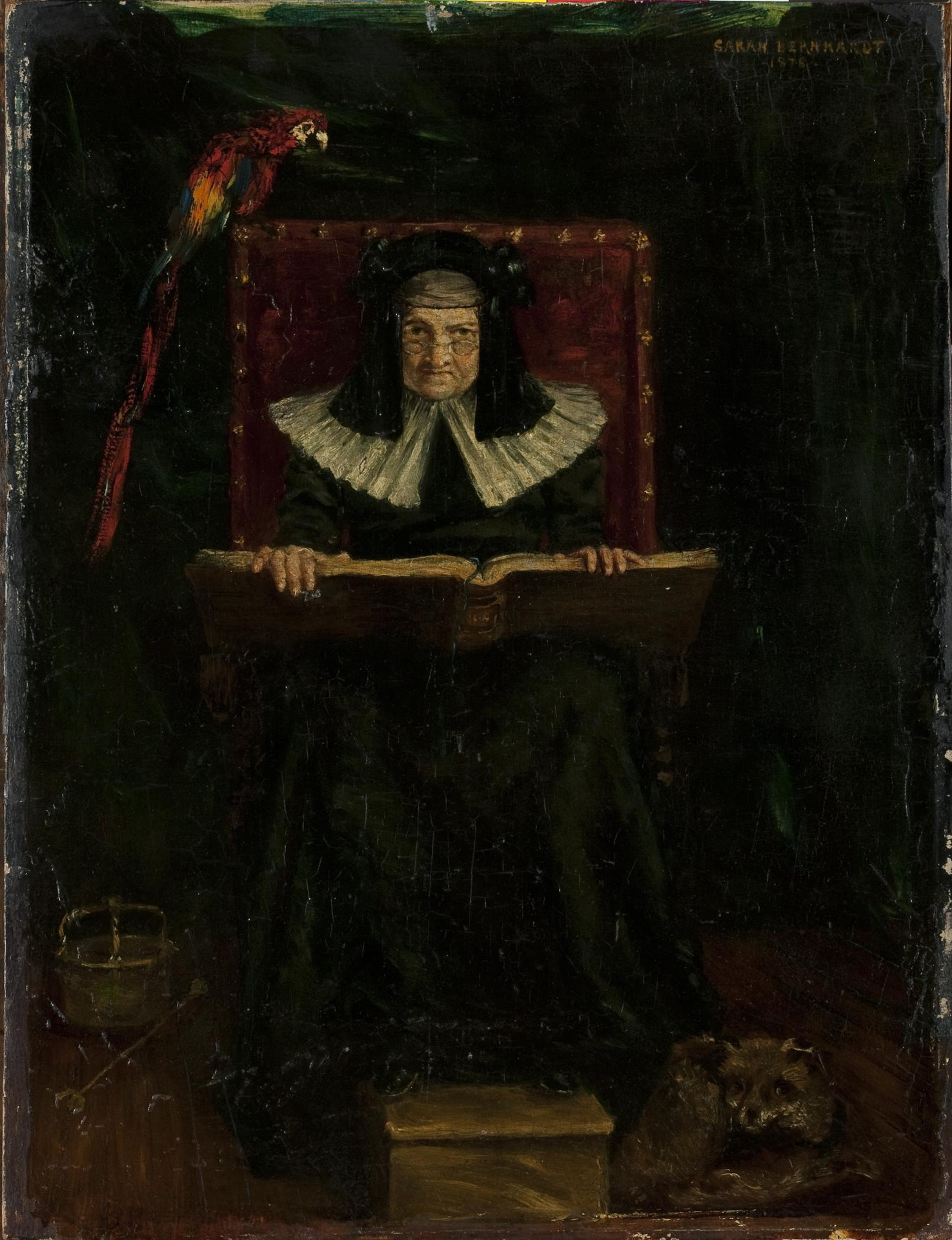 Сара Бернар. Портрет Старухи. 1978 год. Дерево, масло. 34х26 см. Коллекция Государственного Эрмитажа. Санкт-Петербург. Россия.